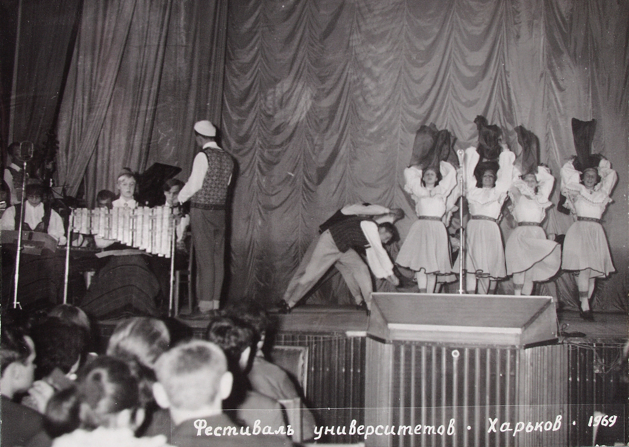 TRÜ RKA esitamas Seppade tantsu ülikoolide festivalil Harkovis.